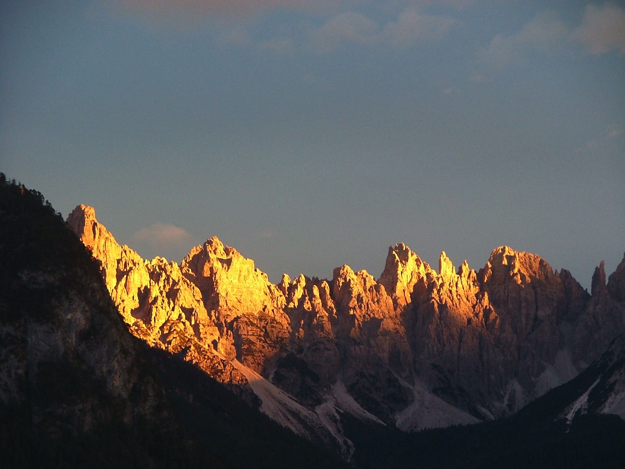 Spalti di Toro, Domegge di Cadore, Belluno, Italy.